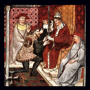 Illustrazione